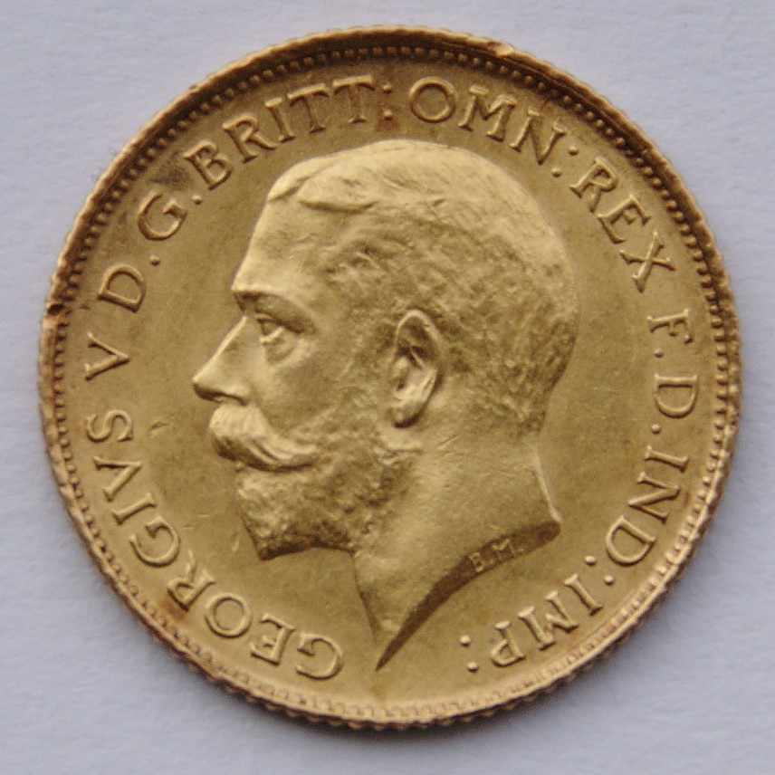 A 1914 half-sovereign minted in Sydney